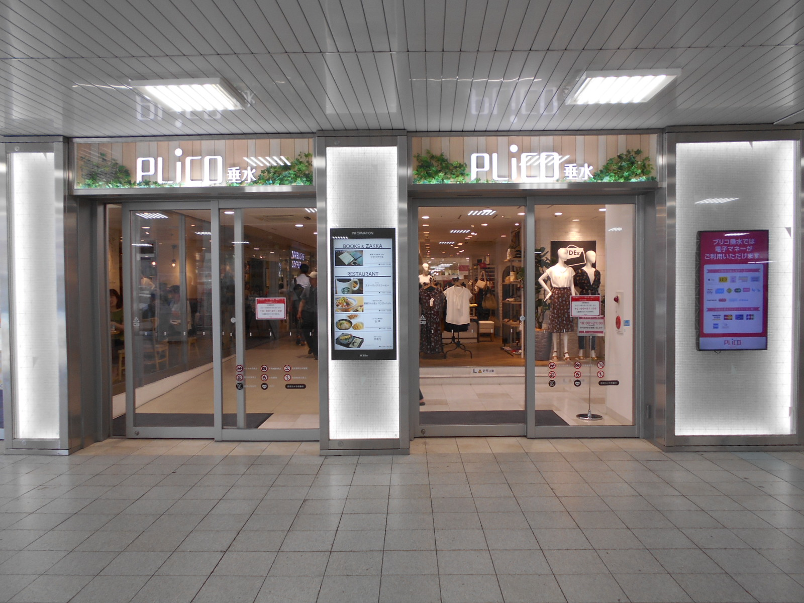 2019年7月撮影